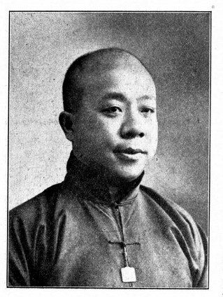 中文（台灣）: 王多輔議員